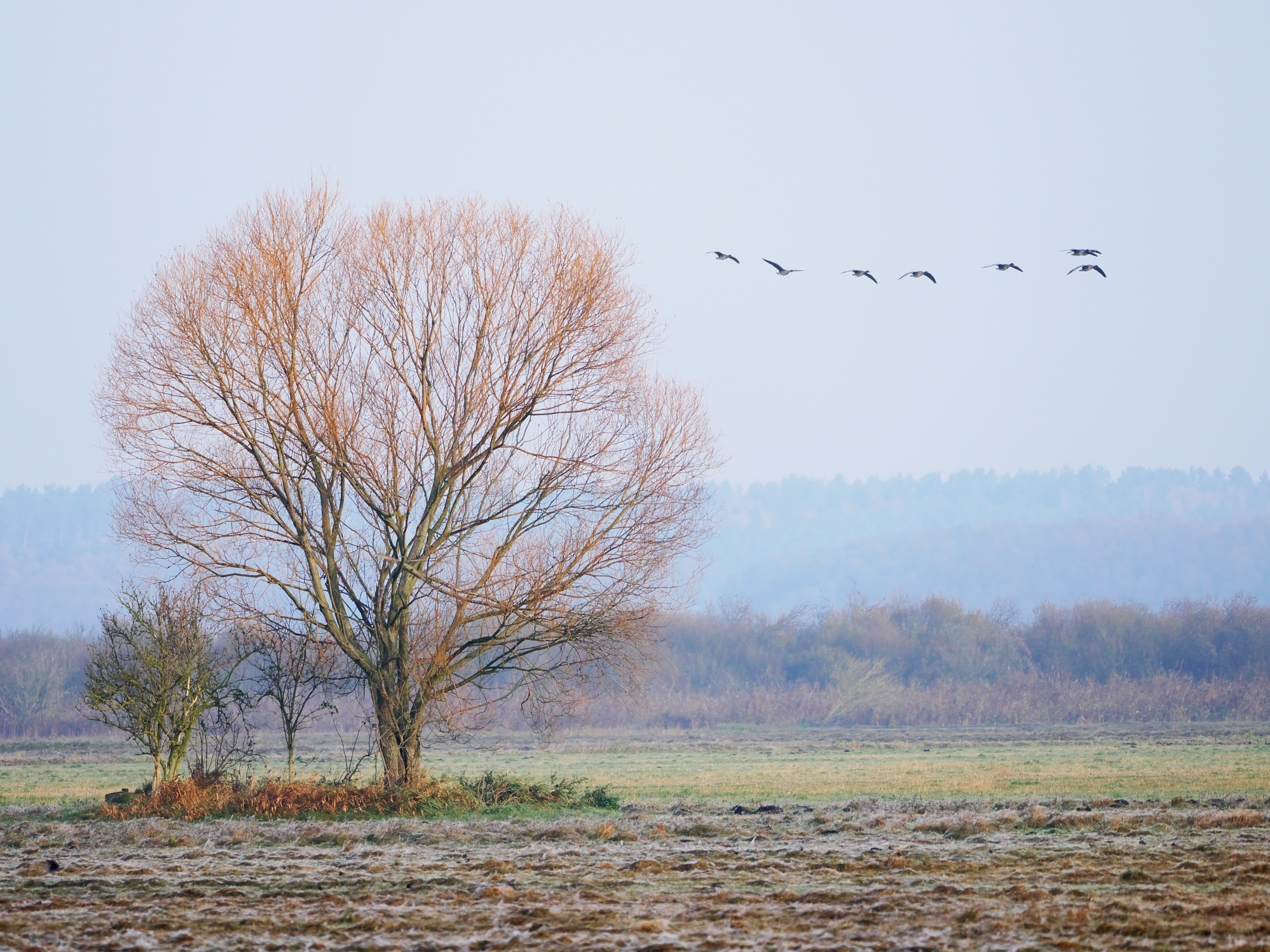 Aufnahme wurde Anfang November 2017 im Naturschuzgebiet Rangsdorfer See in Brandenburg, Deutschland gemacht.